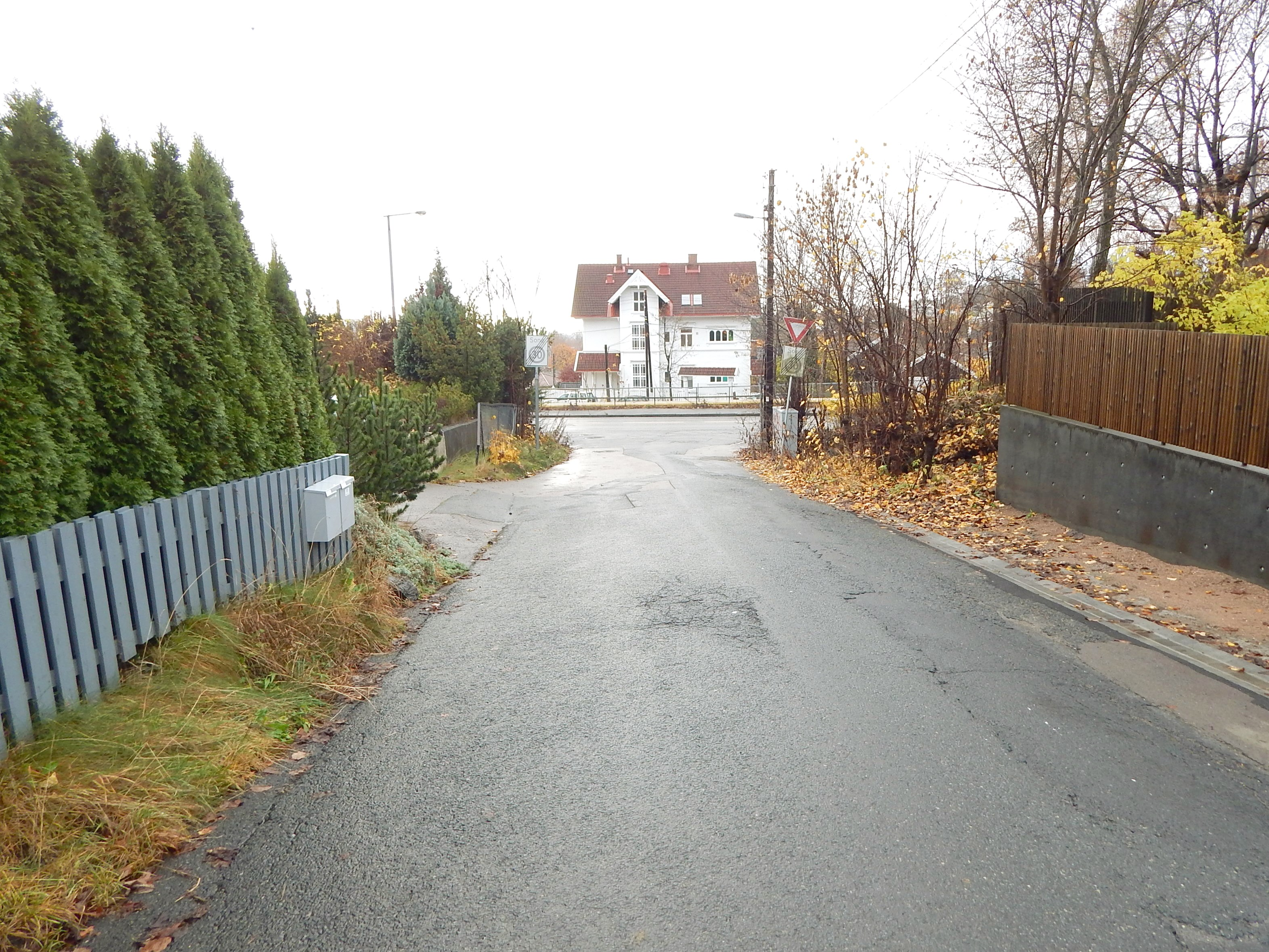 Heyerdahls vei